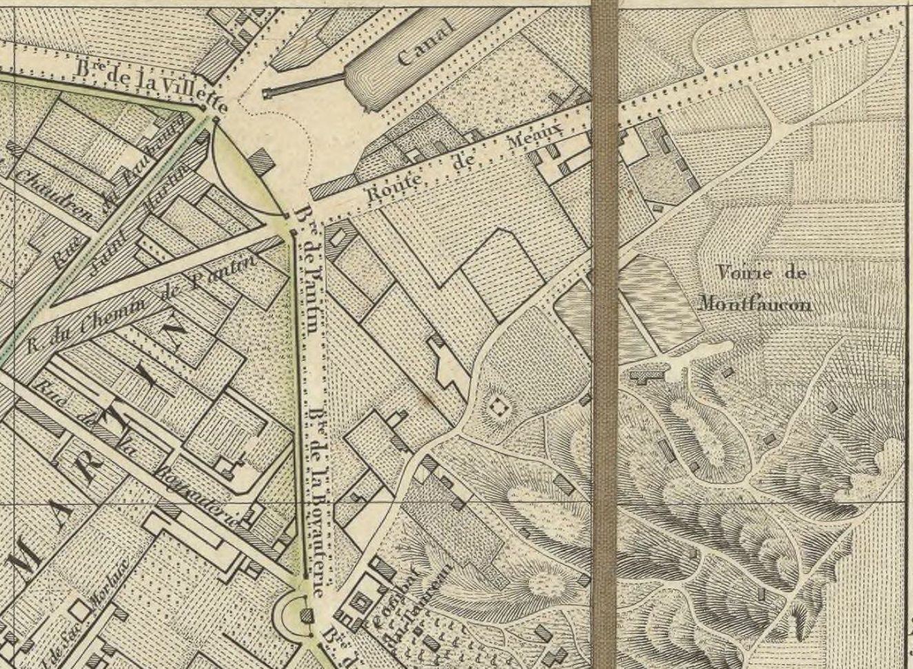 Voirie de Montfaucon in Plan routier de la ville de Paris par Charles Piquet 1821